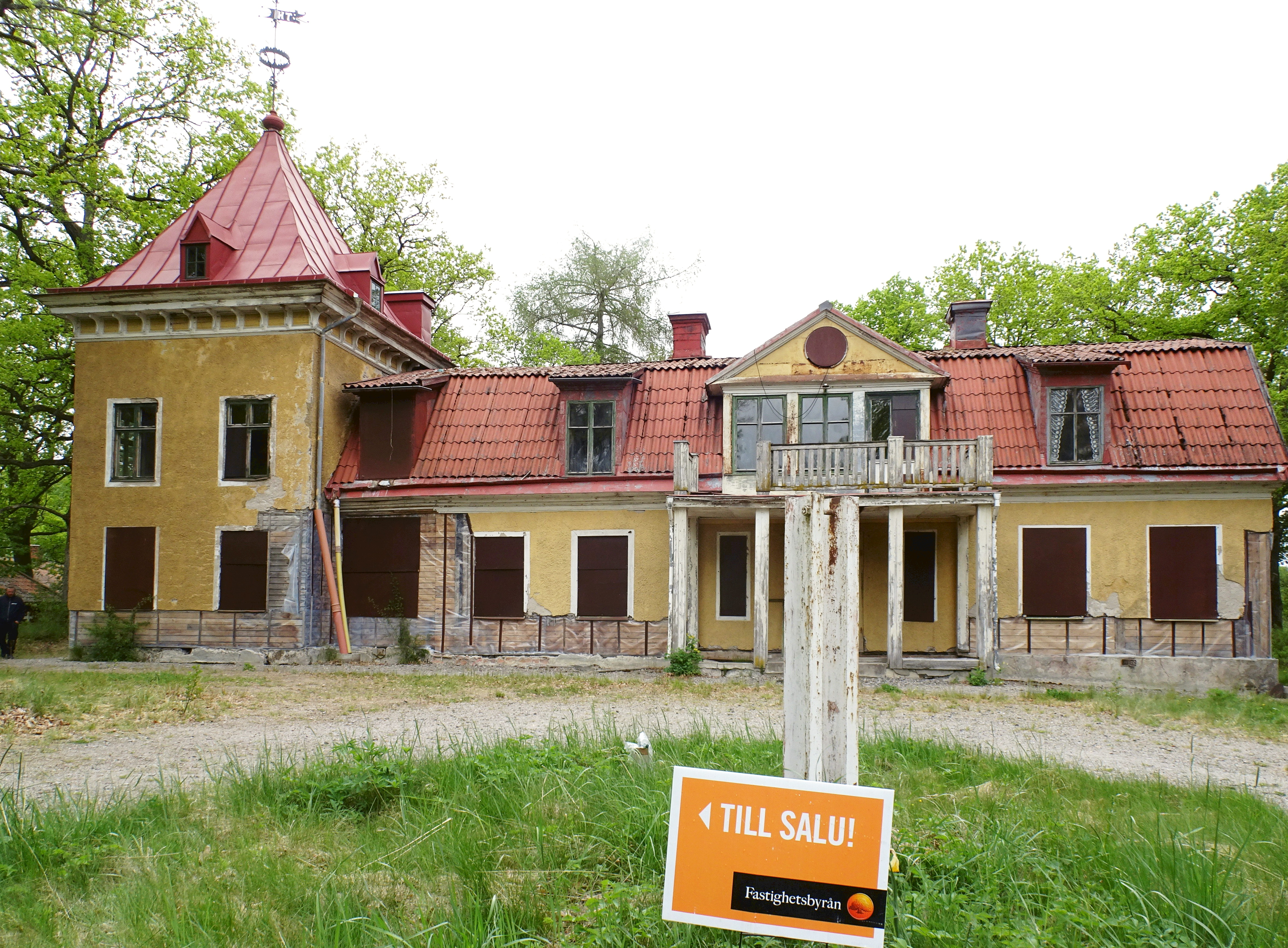 Björksättra gård till salu